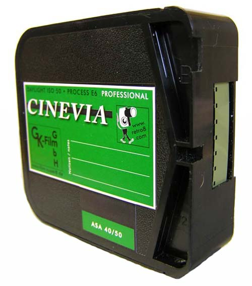 Cartucho de Cinevia